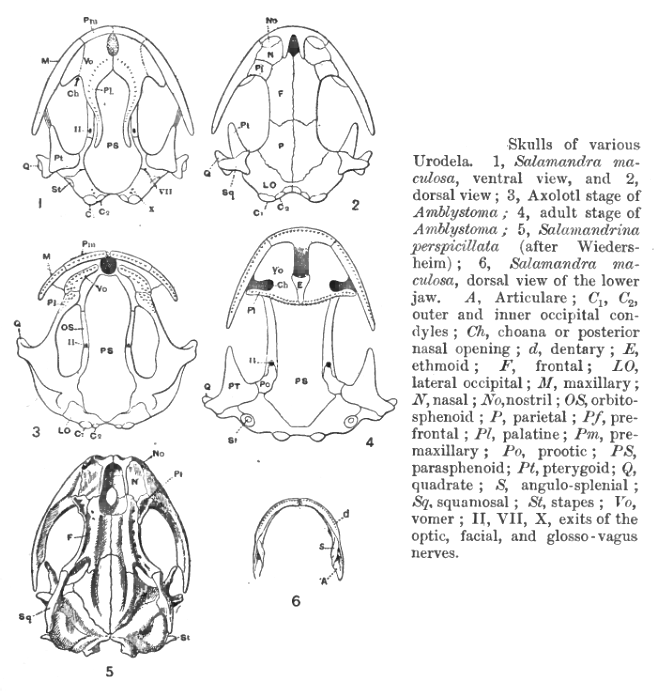 Amphibian skeletons